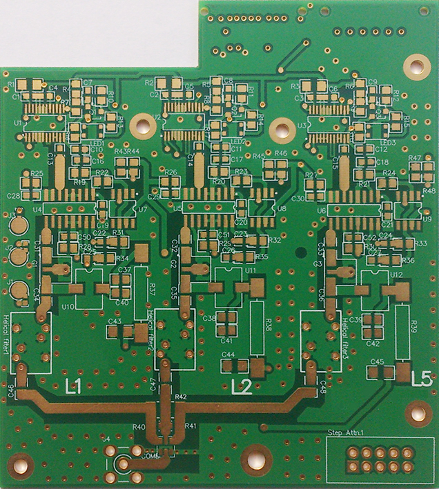 برد مدار چاپی مالتی لایر - 6 لایه - آبکاری طلا تولید شده توسط عرش گستر